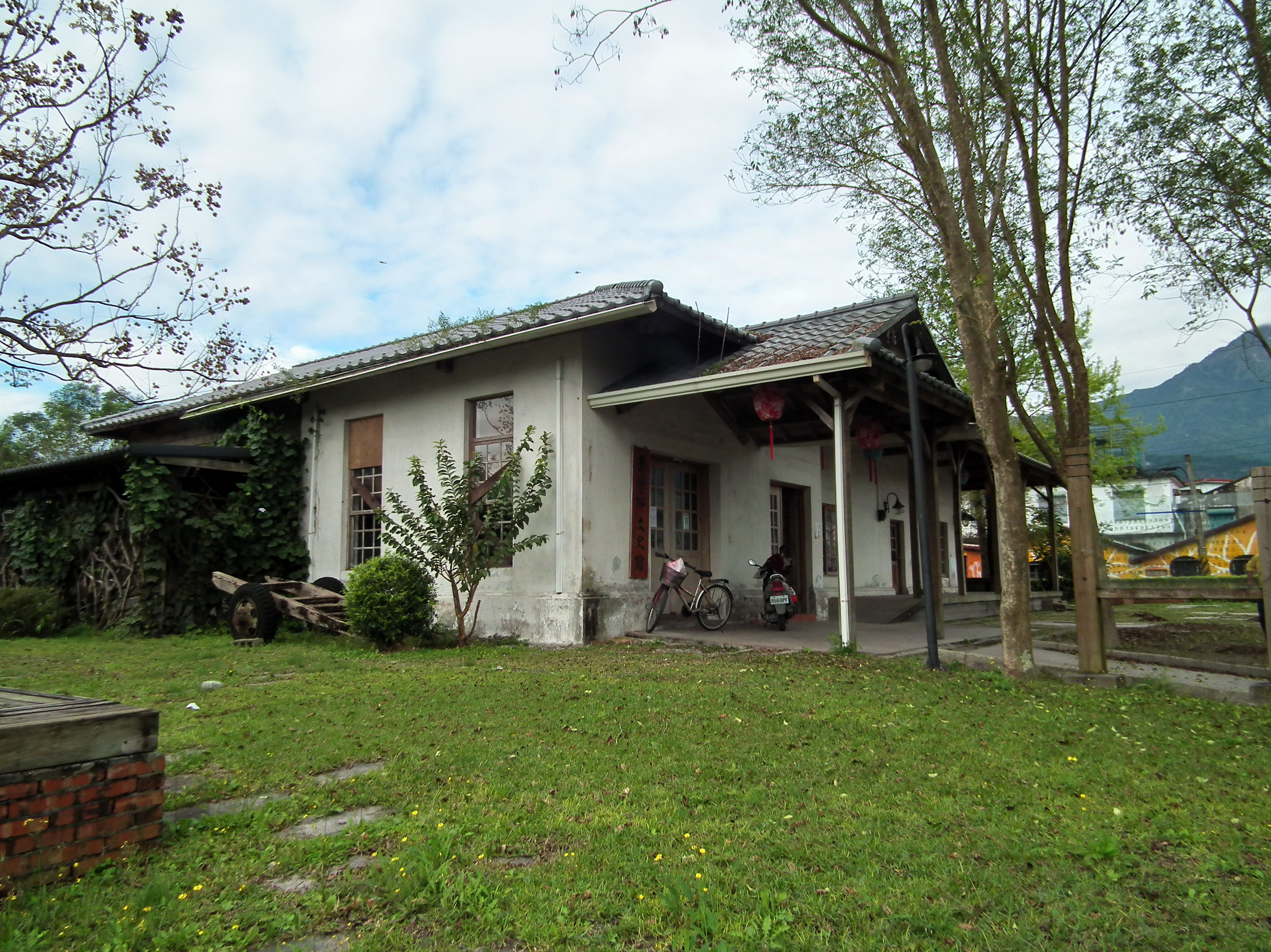 壽豐客家文物館 Shoufeng Hakka Cultural Museum